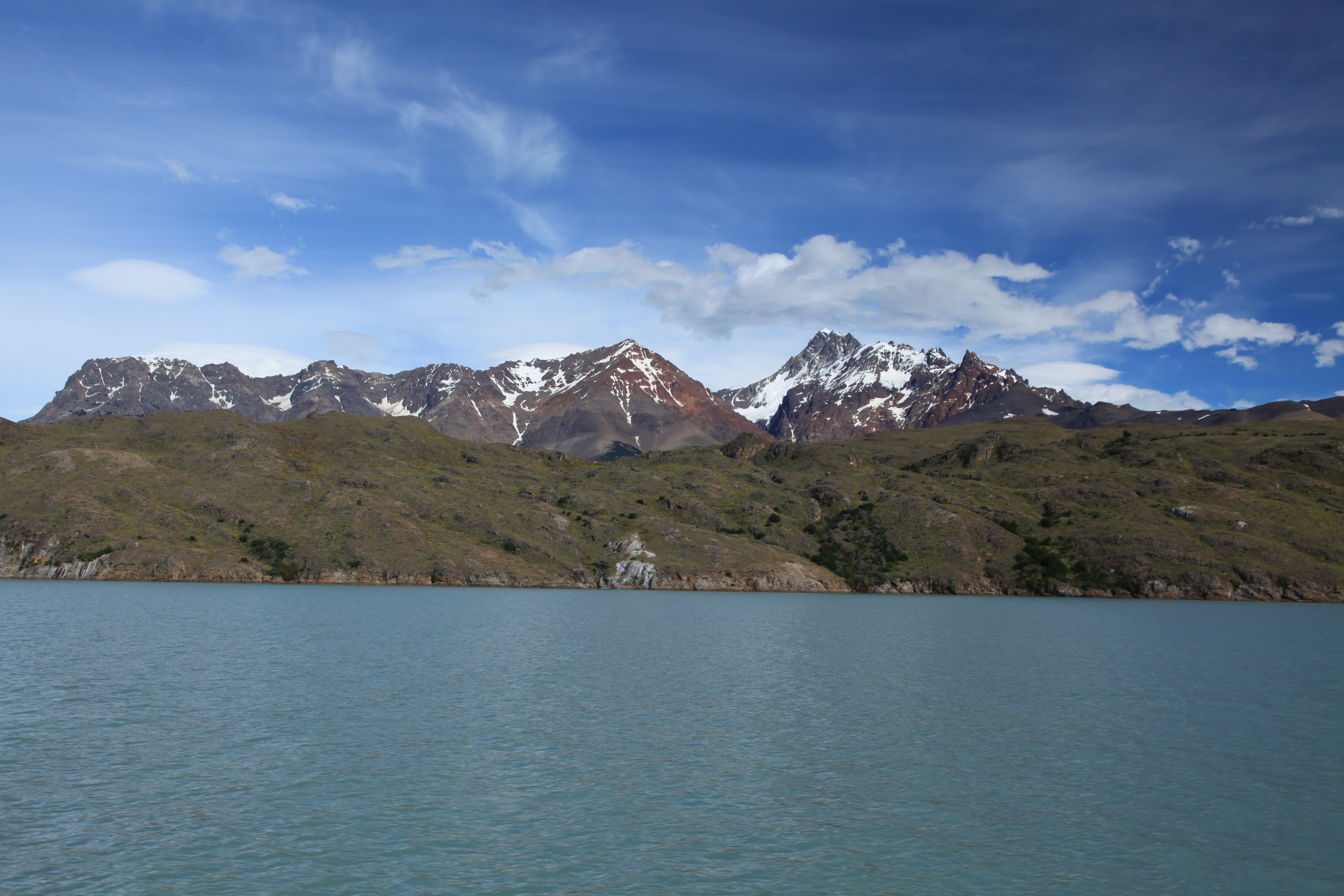 Lake Viedma